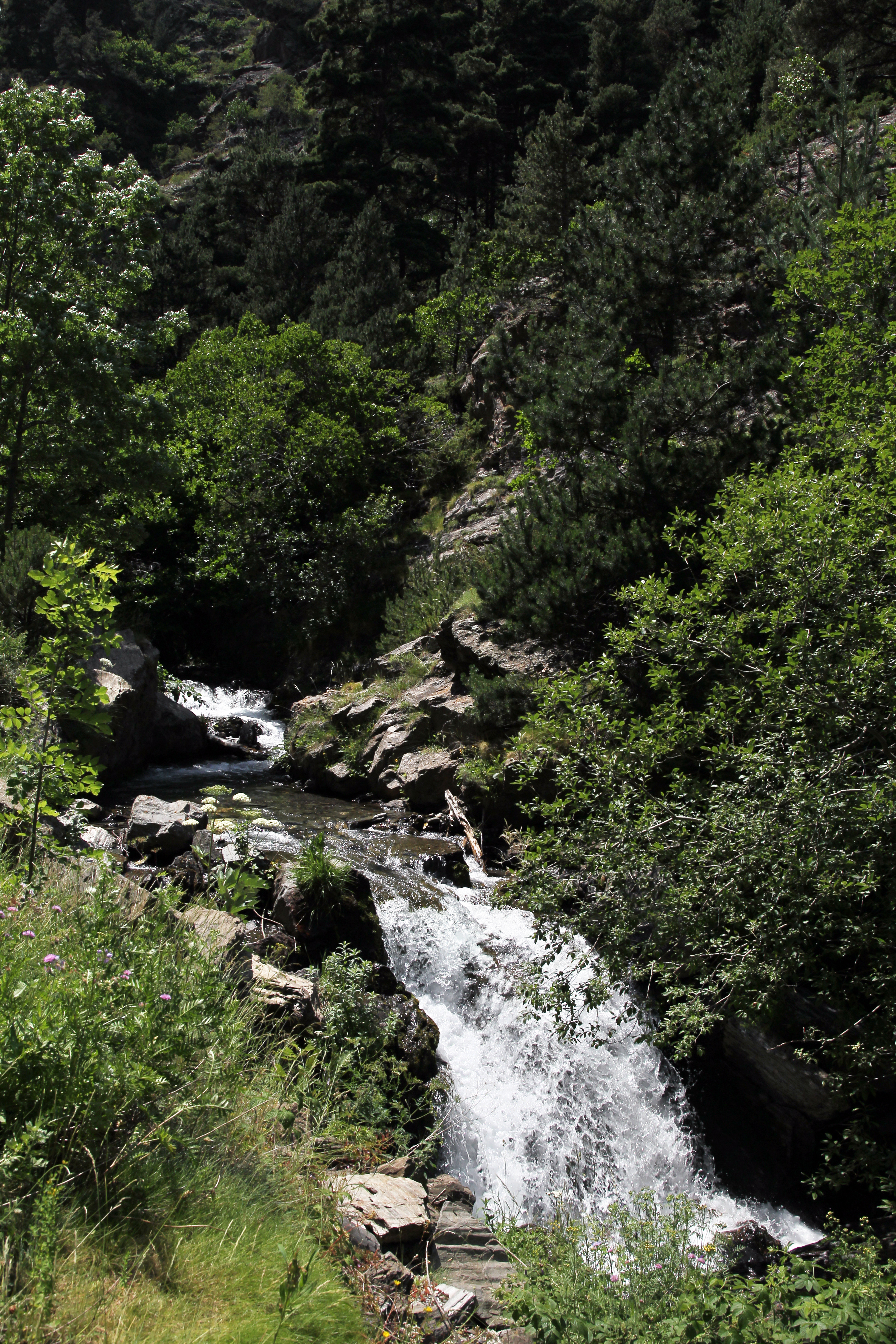 Les gorges du Sègre en Juillet 2019.